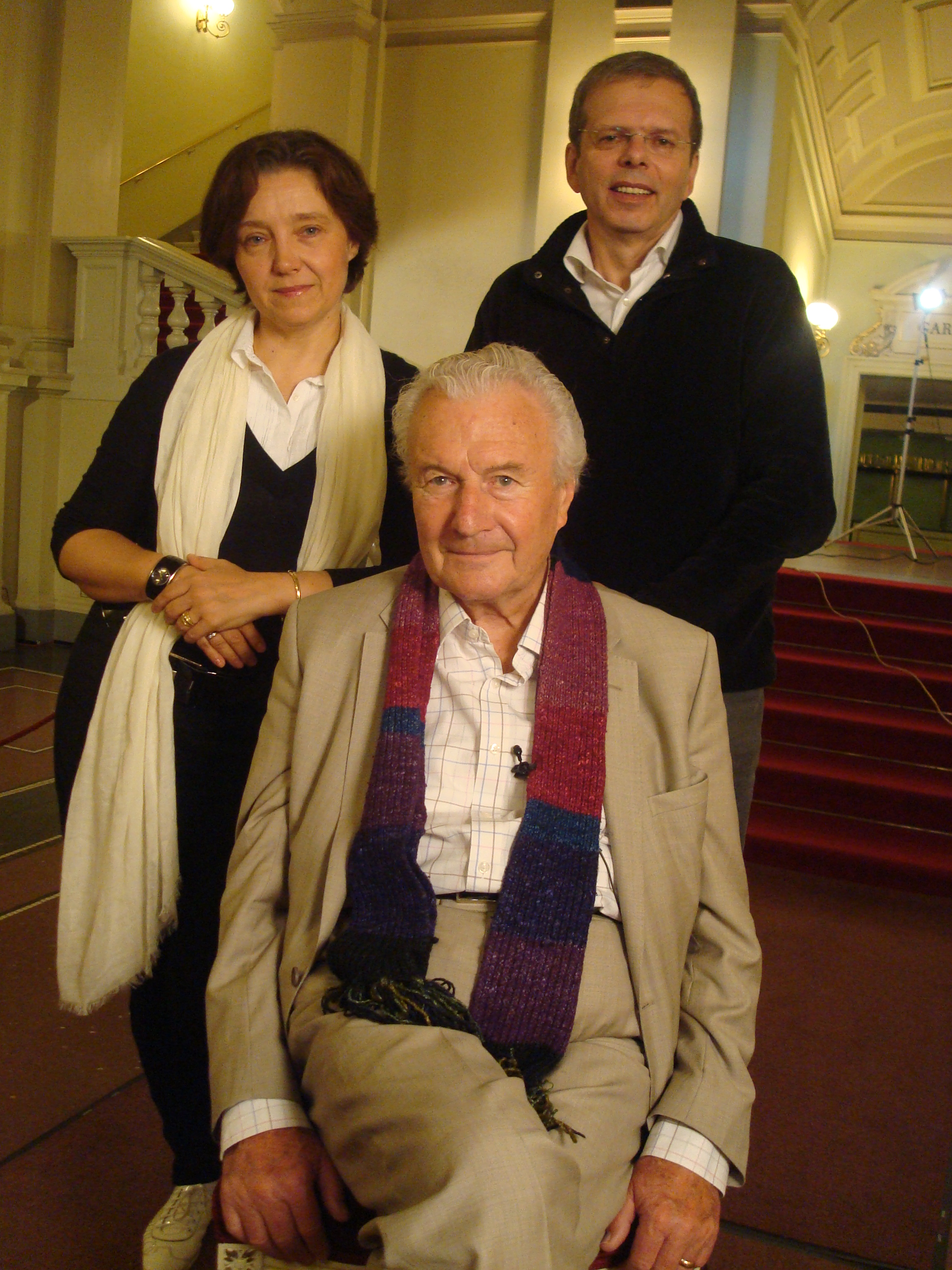 Дирижер Колин Дэвис - Colin Rex Davis -Тихонов Никита Сергеевич - Tikhonov Nikita